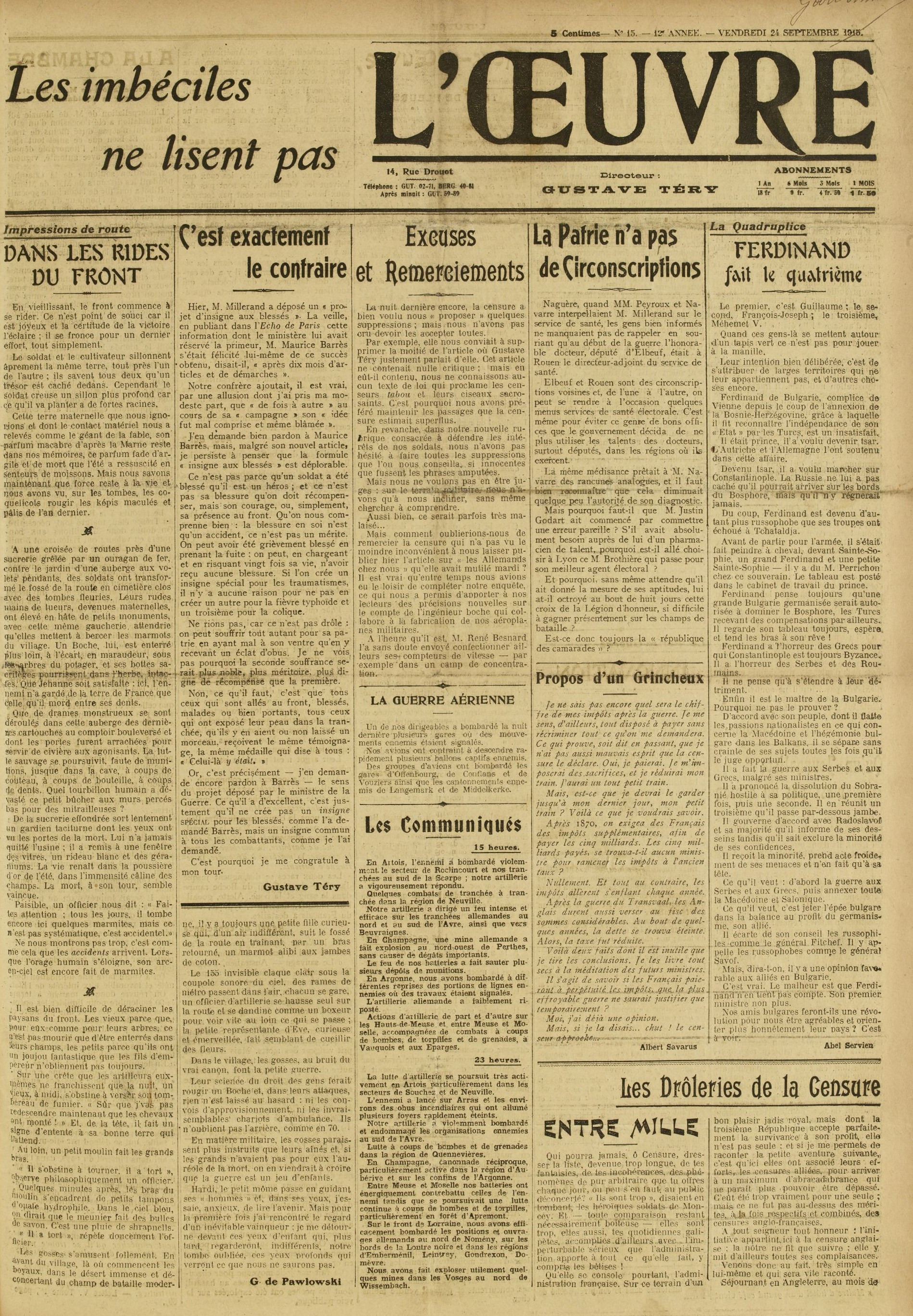 Une de L'Œuvre du 24 septembre 1915, avec le fameux slogan : "Les imbéciles ne lisent pas L'Œuvre".